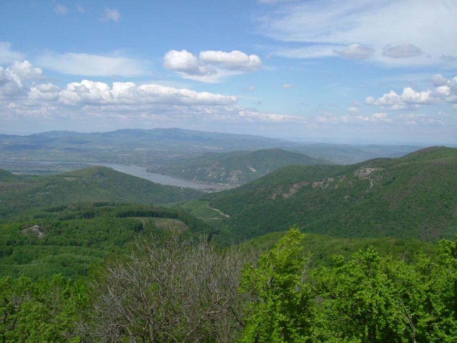 Danube Bend from Dobogó-kő (Visegrád Hills) (Kilátás a Dobogókőrőkl a Dunakanyarra. Készítettem én, dr. Kaboldy Péter 2005.)